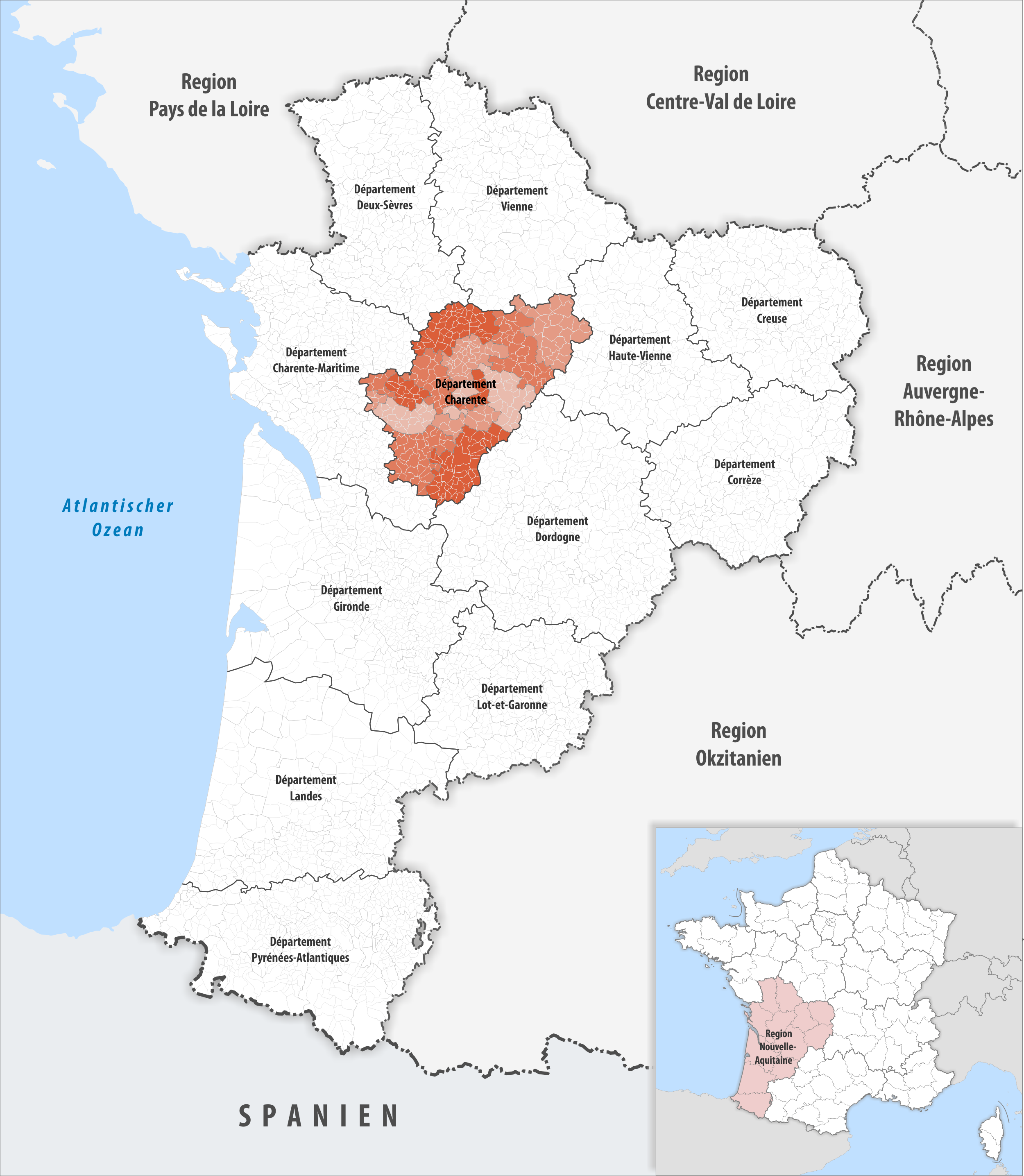 Lage des Departements Charente